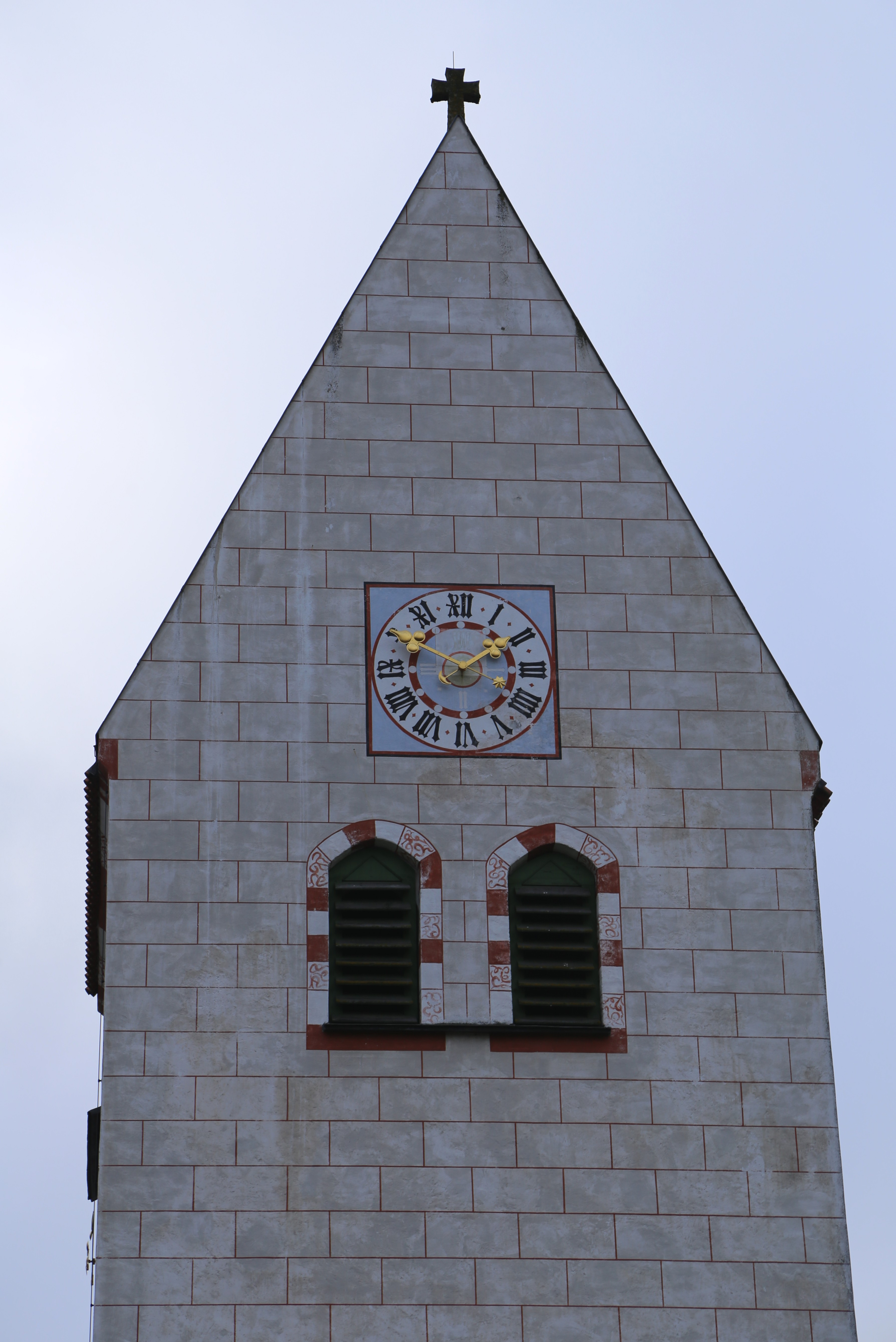 Altkirchen, Oberbiberger Straße 10, Katholische Kuratiekirche Sankt Margareth. Spätgotische Chorturmkirche mit gerade schließendem Chor und wuchtigem Satteldachturm, Langhaus im Kern 11./13. Jahrhundert, Umgestaltung 15. Jahrhundert, Barockisierung um 1680, nach Westen erweitert 1965, mit Ausstattung. Friedhofsmauer, massiv. Leichenhaus, Putzbau mit steilem Satteldach im Reformstil, um 1920